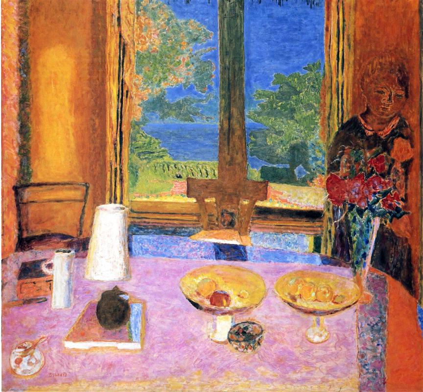 Salle à manger à la campagne, huile sur toile, 127 x 135 cm